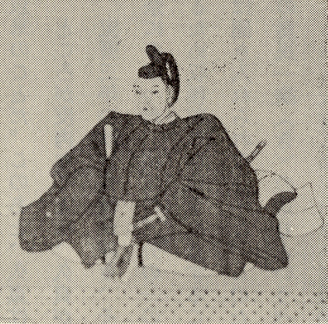 中川久貞の肖像(モノクロ)。